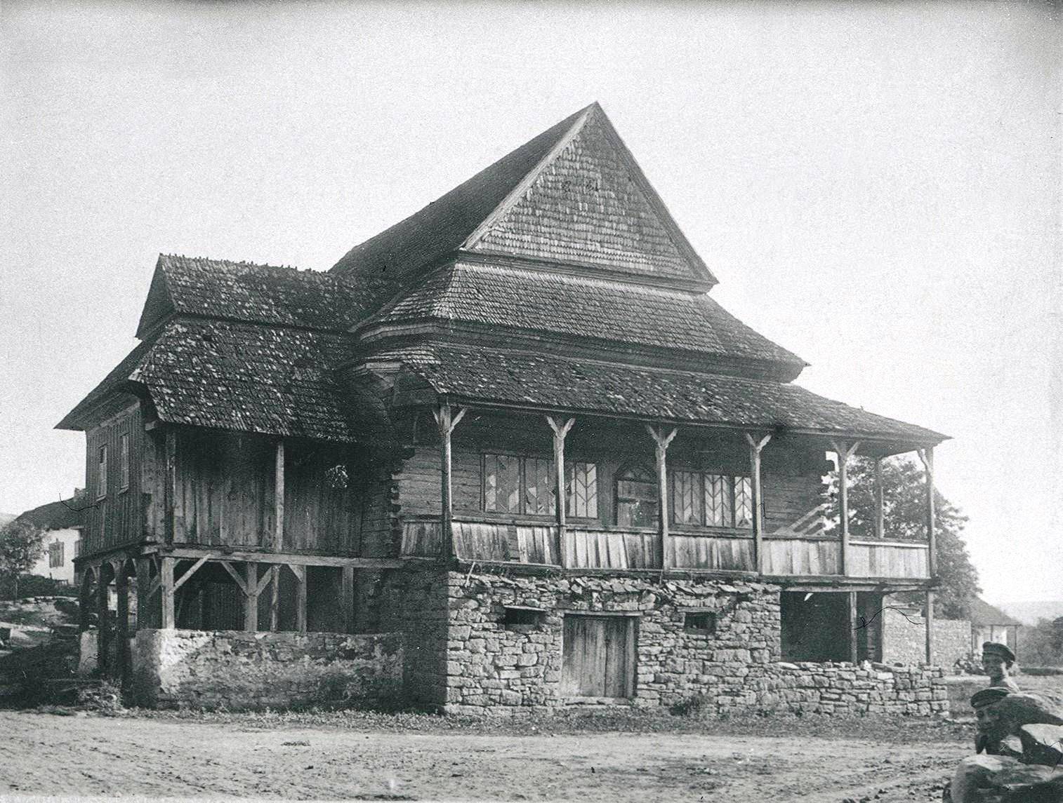 Деревянная синагога в Ярышеве, архивное фото экспедиции П. Жолтовского.